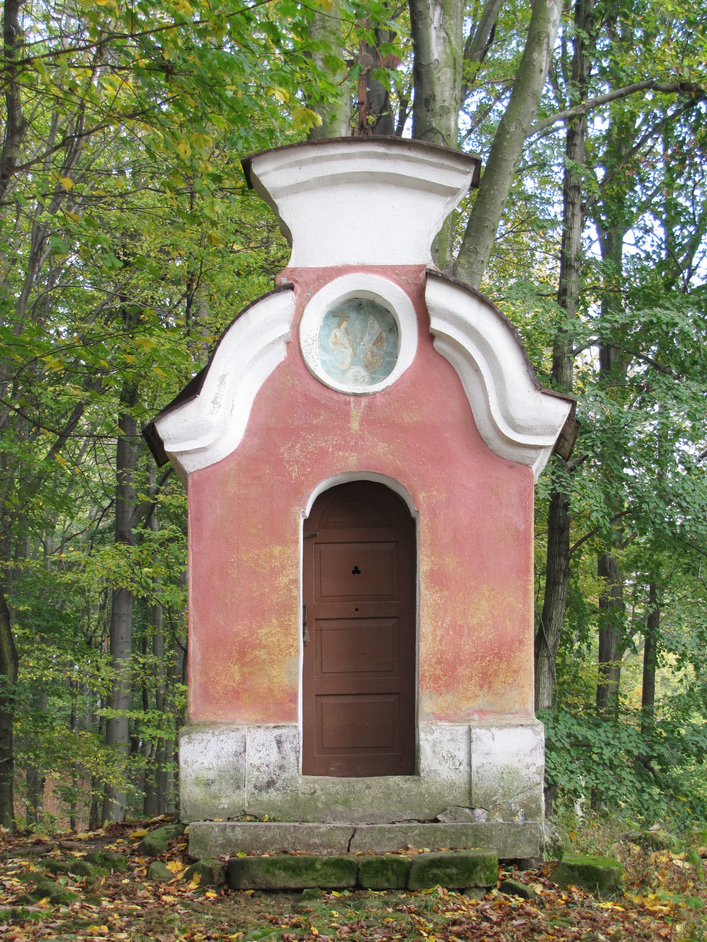 Koryčanská kaple v Chřibech